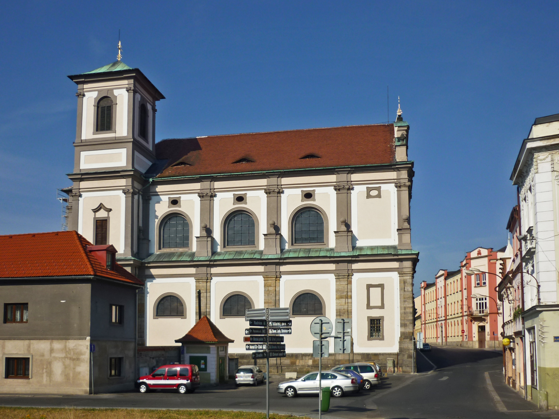 Allerheiligenkirche in Böhmisch Leipa (Česká Lípa)